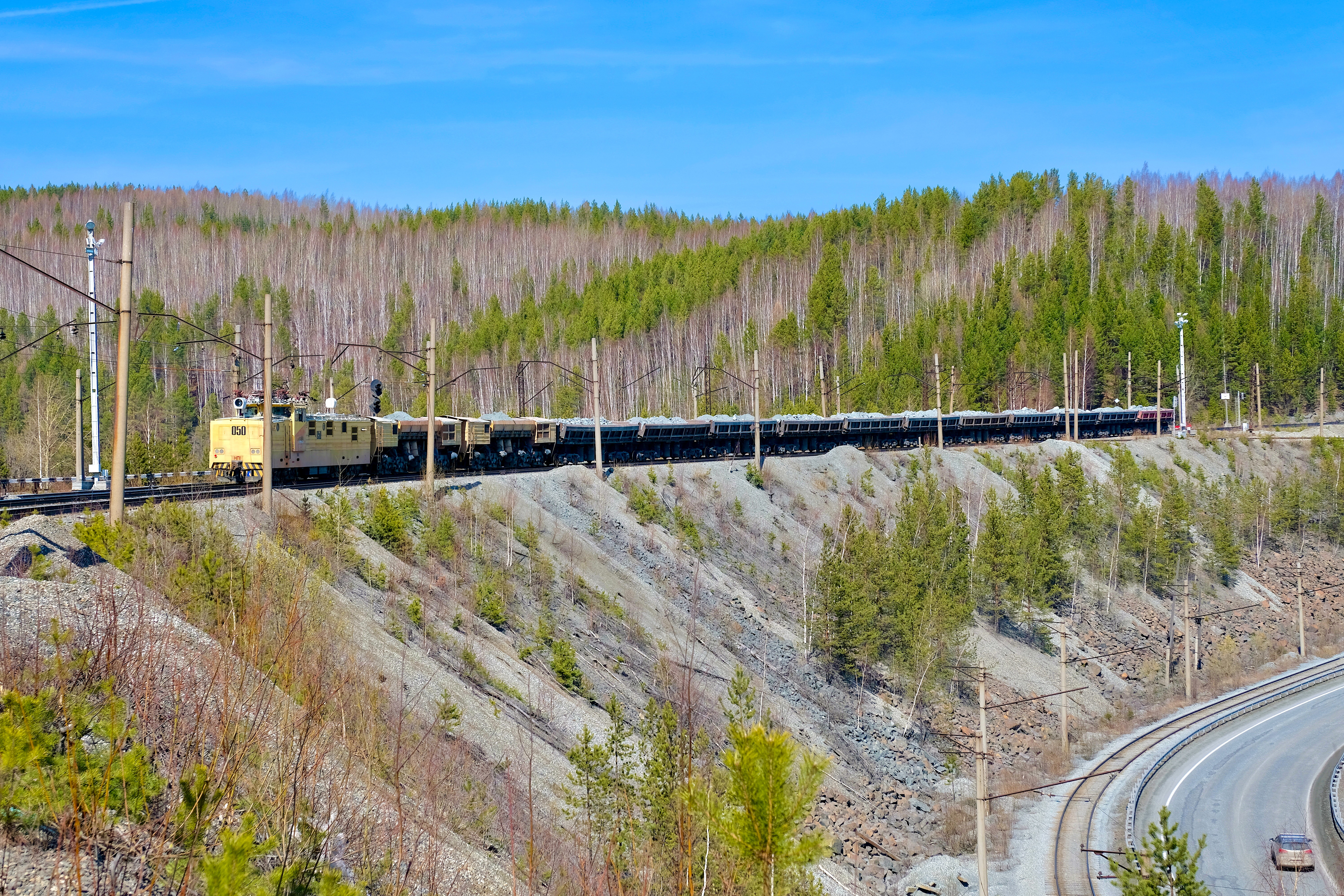 Промышленный электровоз НП1 (тяговый агрегат) с составом думпкаров. Доставка руды из карьеров Качканарского ГОКа на дробильную фабрику